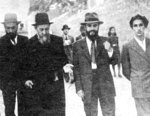 יצחק זאב הלוי סולובייצ'יק בירושלים. לצדו בנו משולם דוד הלוי סולובייצ'יק